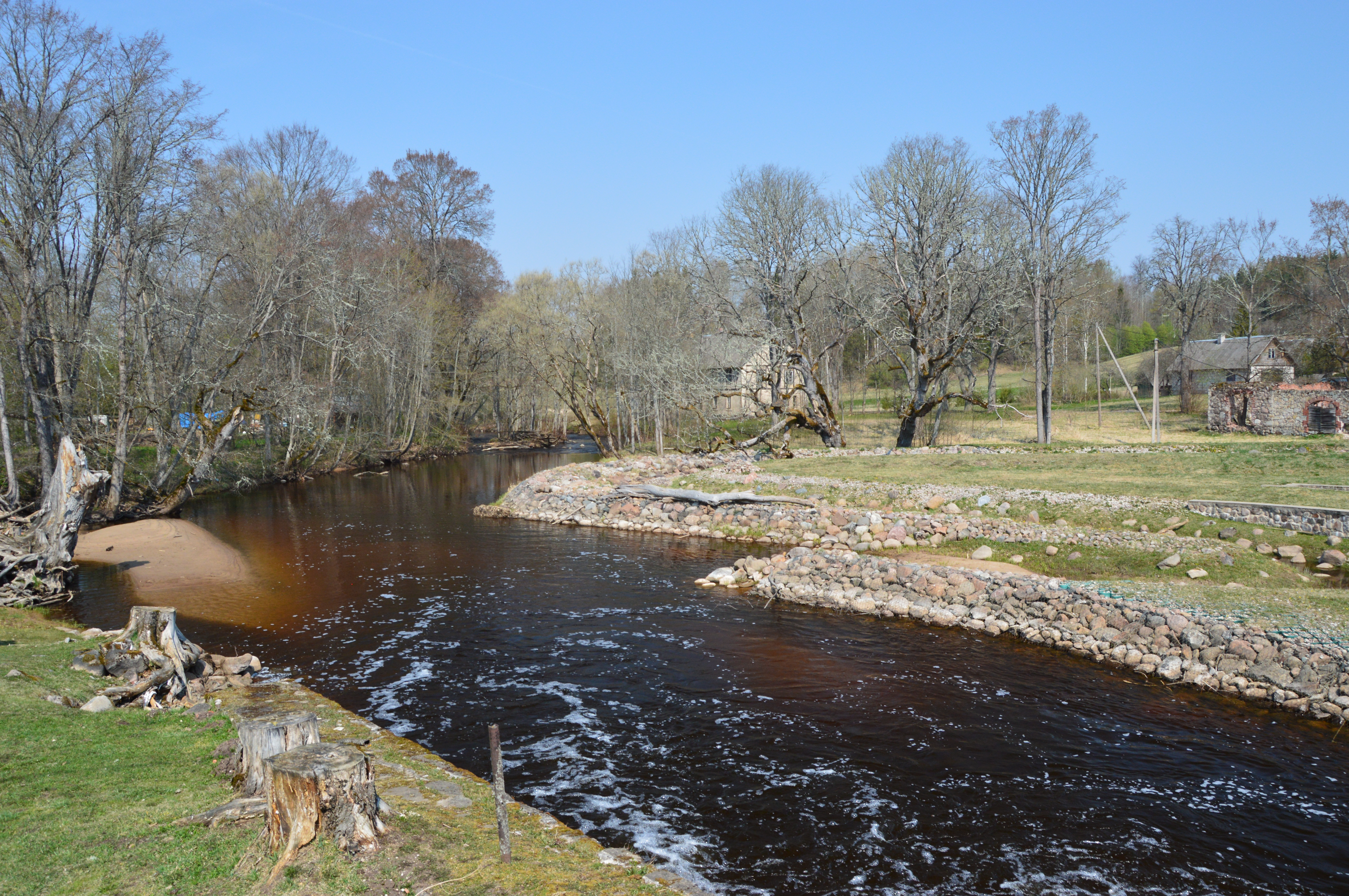 Vaidva jõgi vahetult Vastse-Roosa veskitest allavoolu.